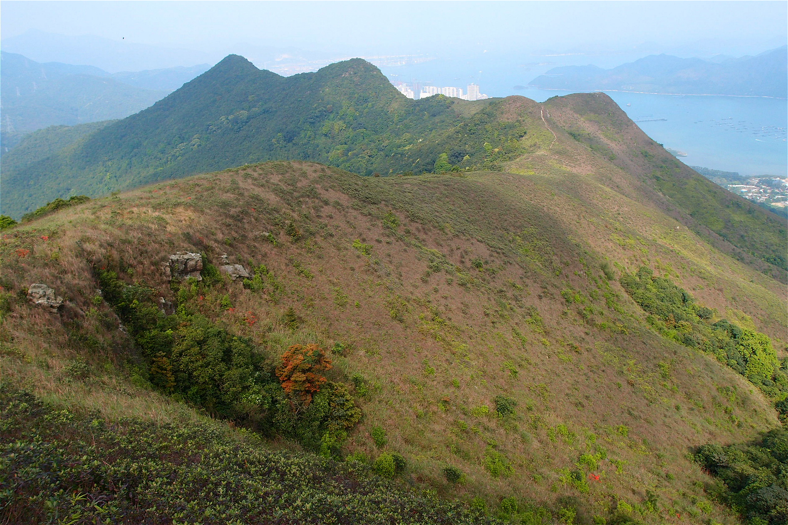 中文（香港）: 紅花寨的西脊